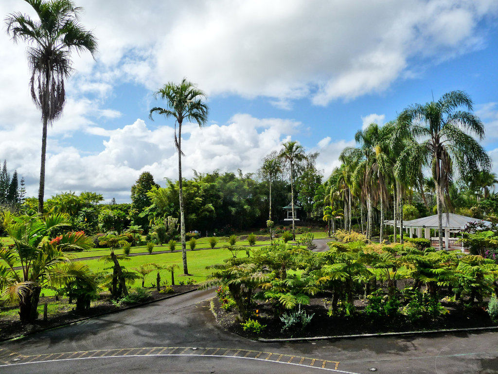 Nani Mau Gardens